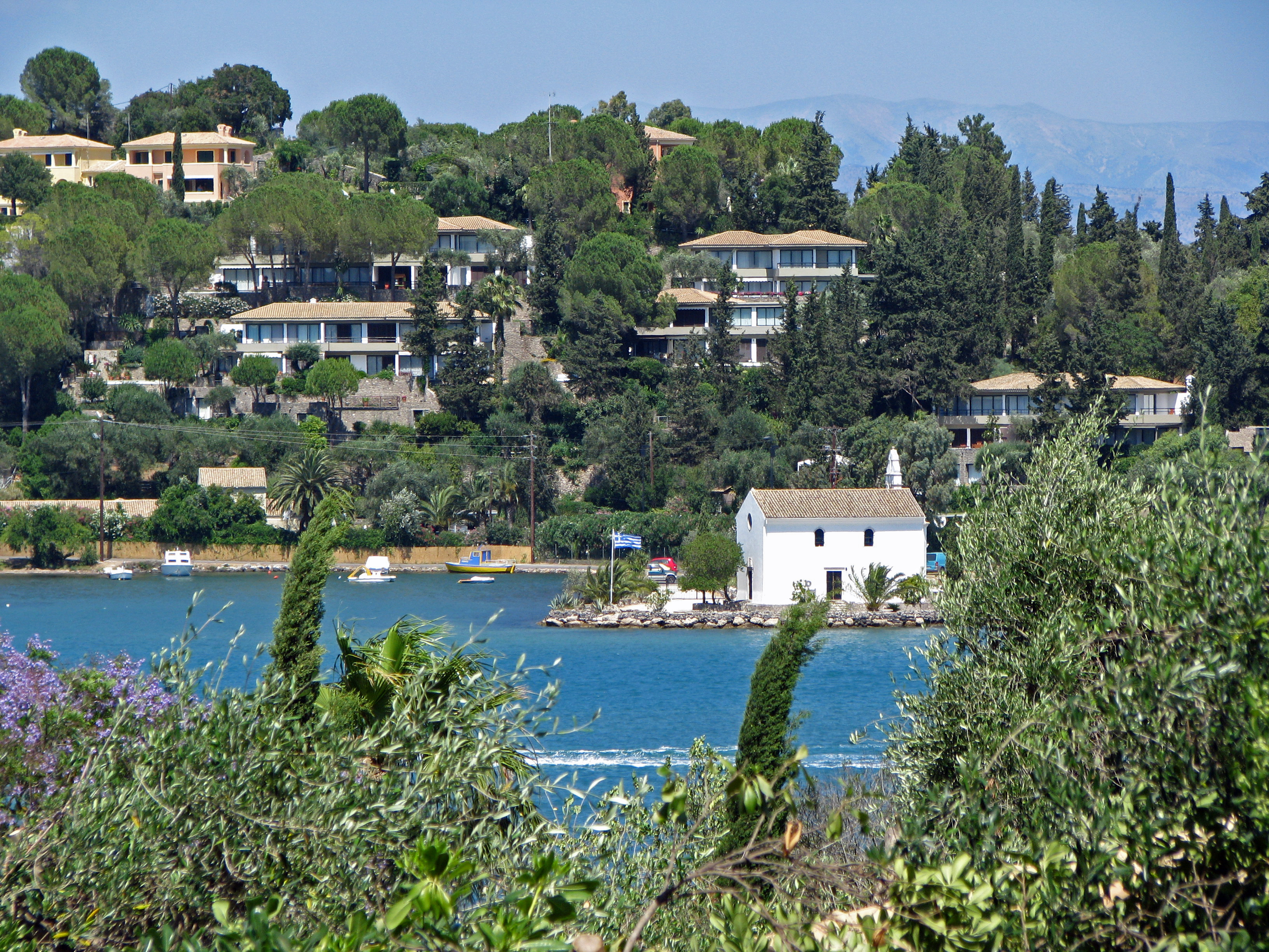 Деревня Лимни напротив посёлка Гувья и церковь Ипанпанди (о. Керкира, Греция)